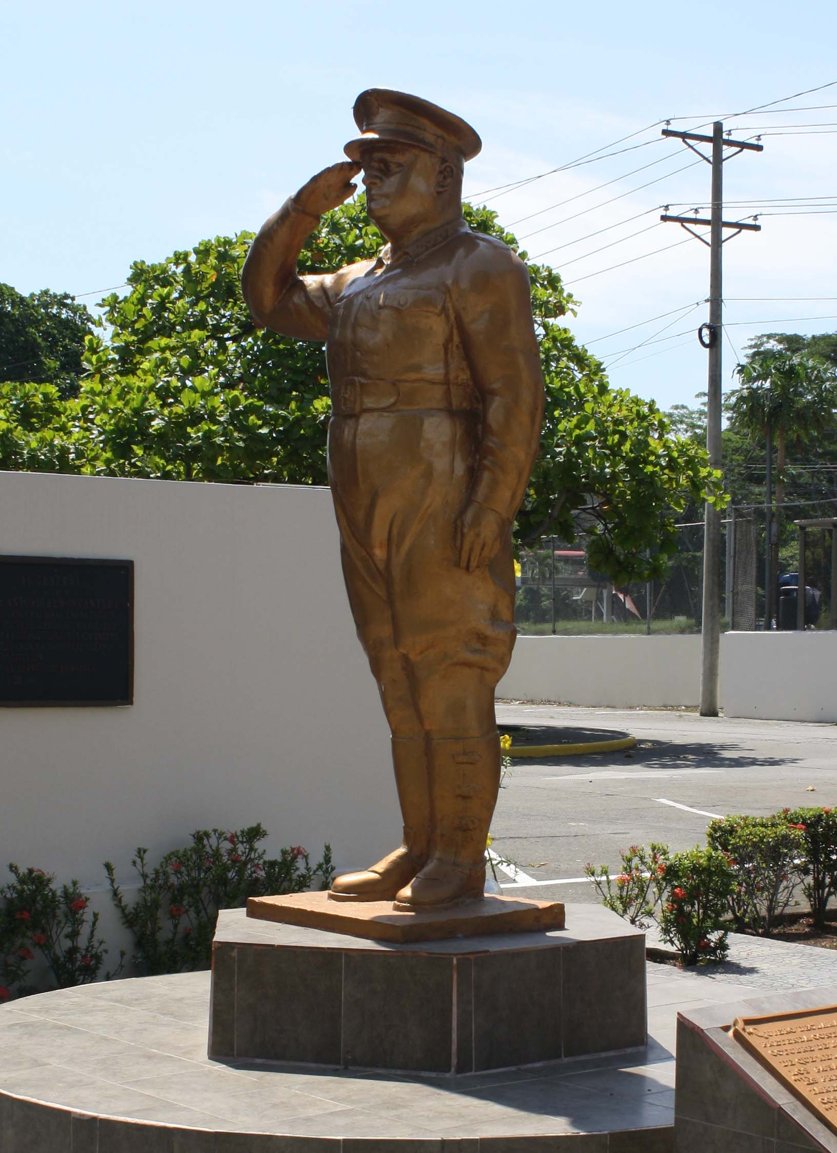 Estatua del Coronel José Antonio Remón Cantera, quien fue Presidente de la República de Panamá y en su período se promulgó la ley No. 44 de 28 de diciembre de 1953, que cambia a la Policía Nacional a Guardia Nacional, procediendo a estructurar un plan de modernización que incluía el envío de oficiales a especializarse fuera del país., bajo e lema "Todo por La Patria". Por ser parte de la historia de la Policía Nacional, surge la iniciativa de ubicar la estatua en la parte frontal de la Sede de la Policía Nacional de Panamá, junto al asta donde es izada la Bandera Nacional, en posición de saludo hacia el emblema patrio.